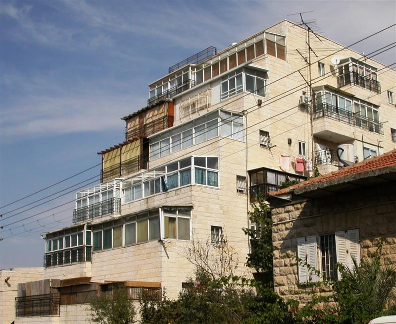 Graded Sukkot In Apartments In Jerusalem